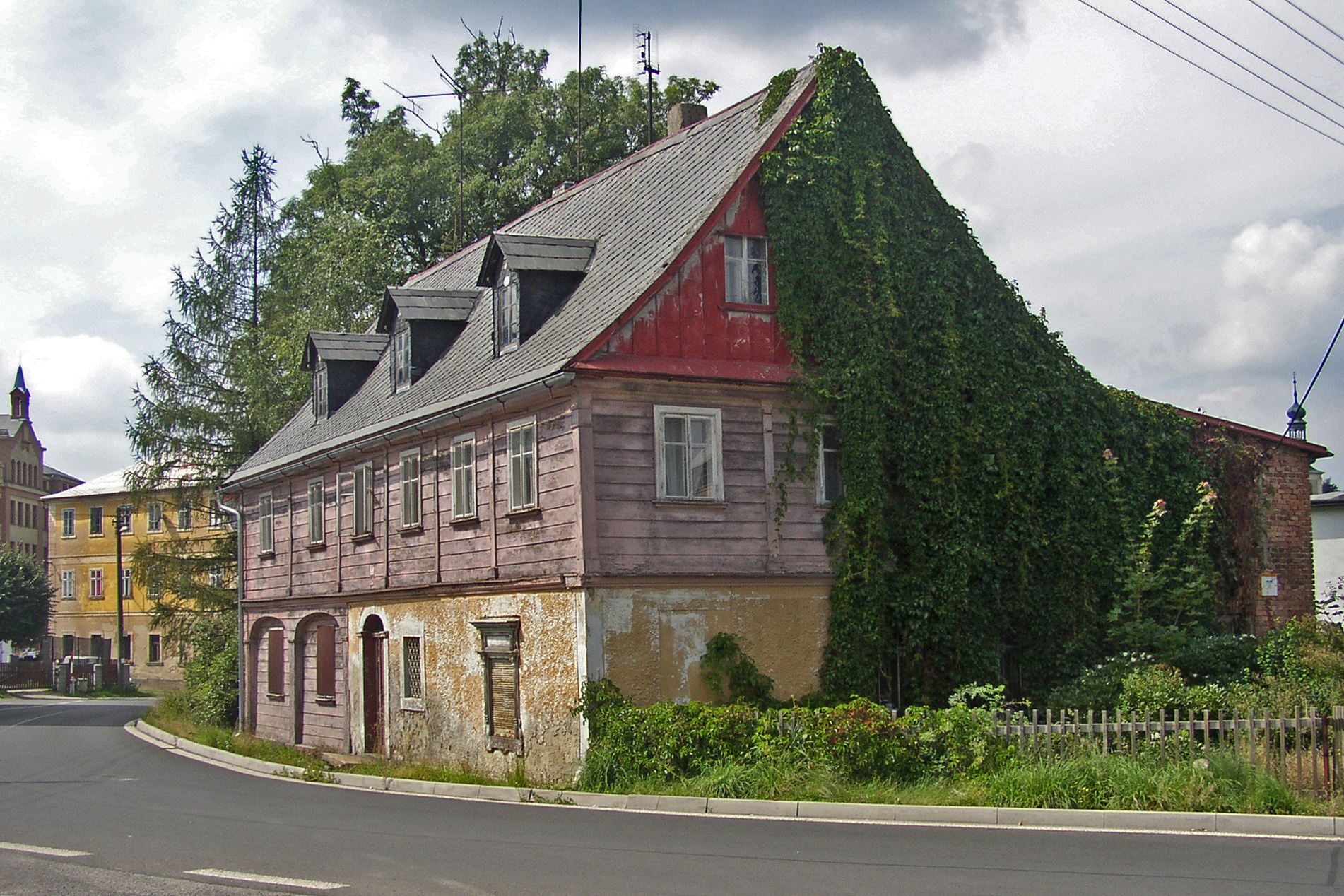 Rodný dům Augusta Frinda, Varnsdorfská 224/5, Krásná Lípa